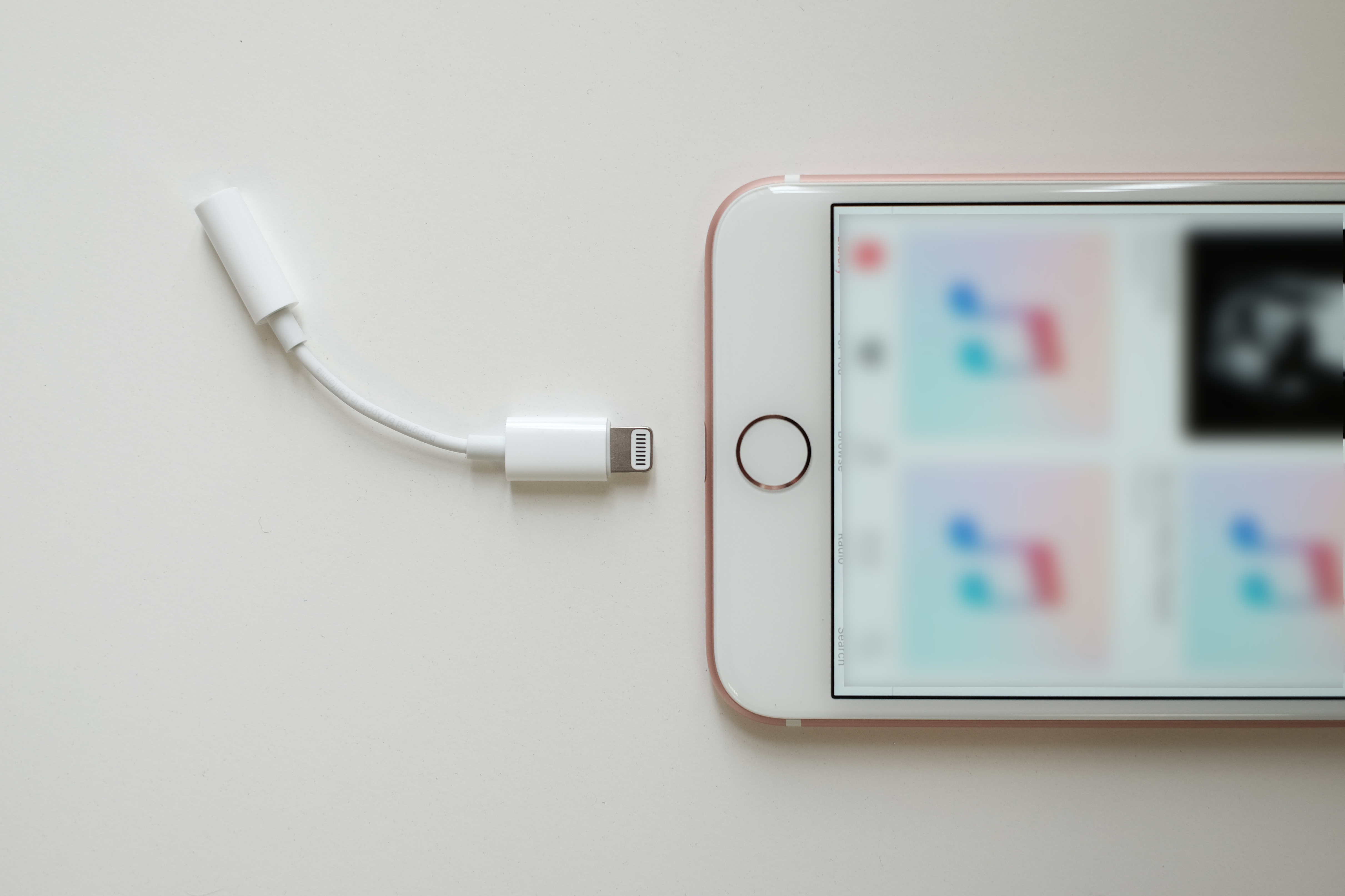 iPhone 7 Plus